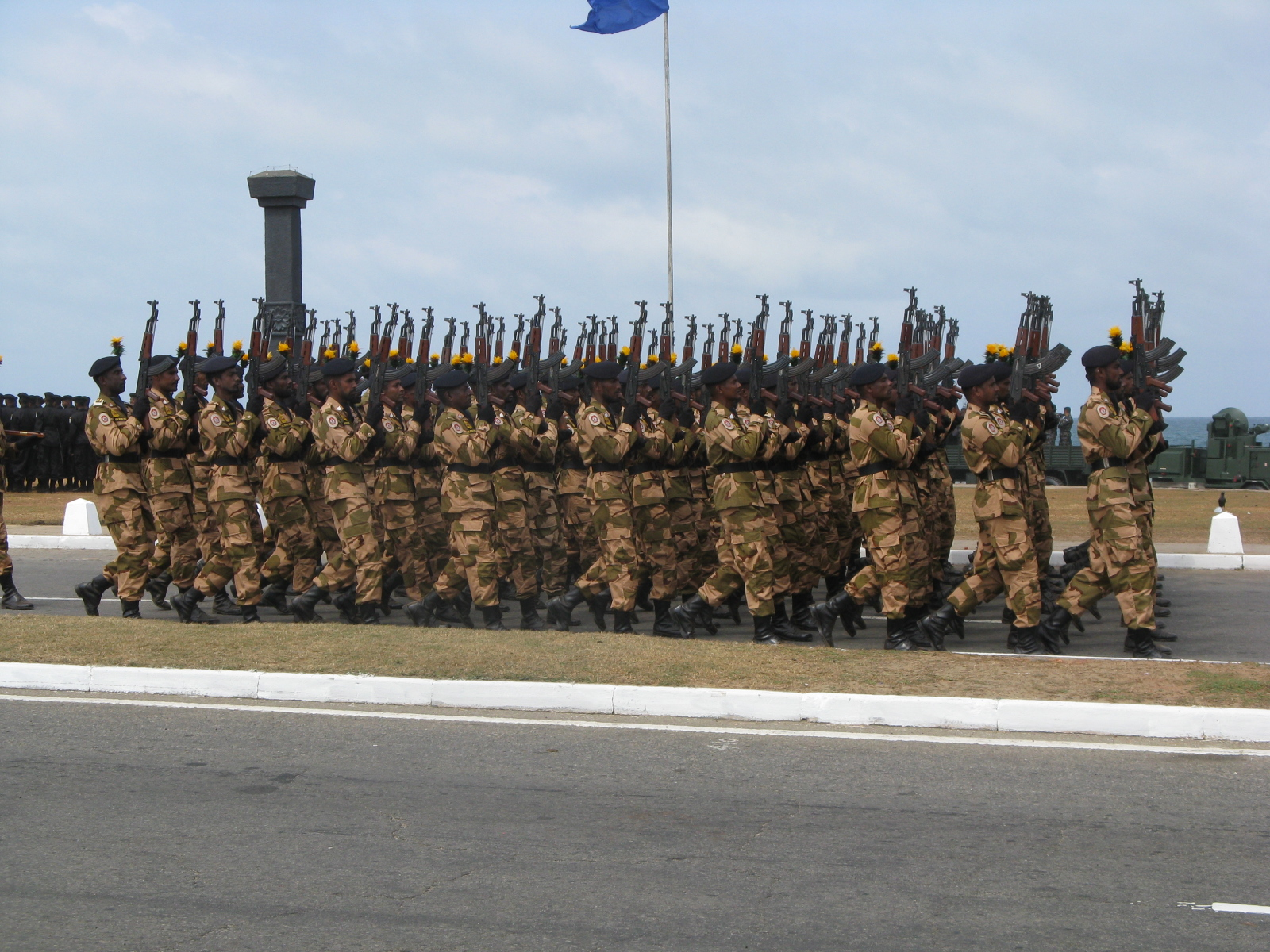 Sri Lanka Army